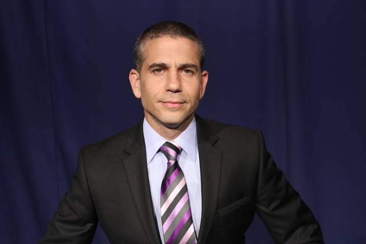 he:ינון מגל